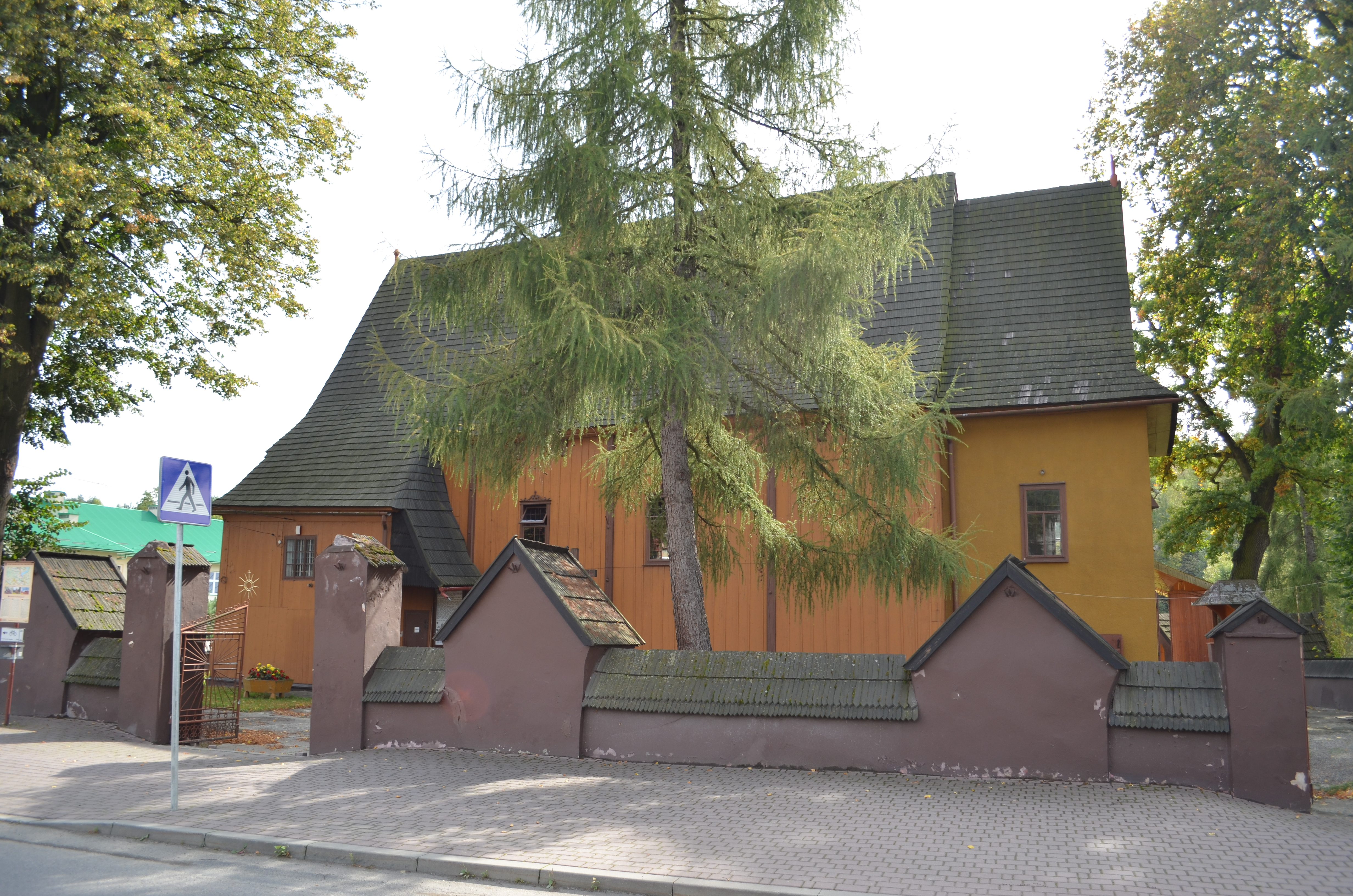 Chomranice. Kościół par. p.w. Imienia Marii, 1692, kon. XIX.